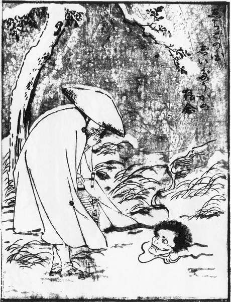 Yadōkai (宿借) from the Rekkoku-kaidan-kikigaki-zōshi (列国怪談聞書帖)